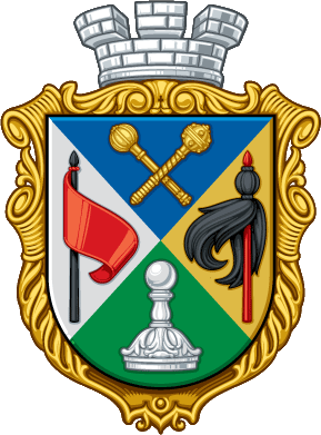 Герб Глухова